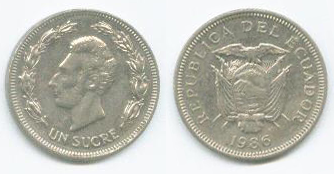 Moneda de 1 sucre. Antigua moneda de Ecuador